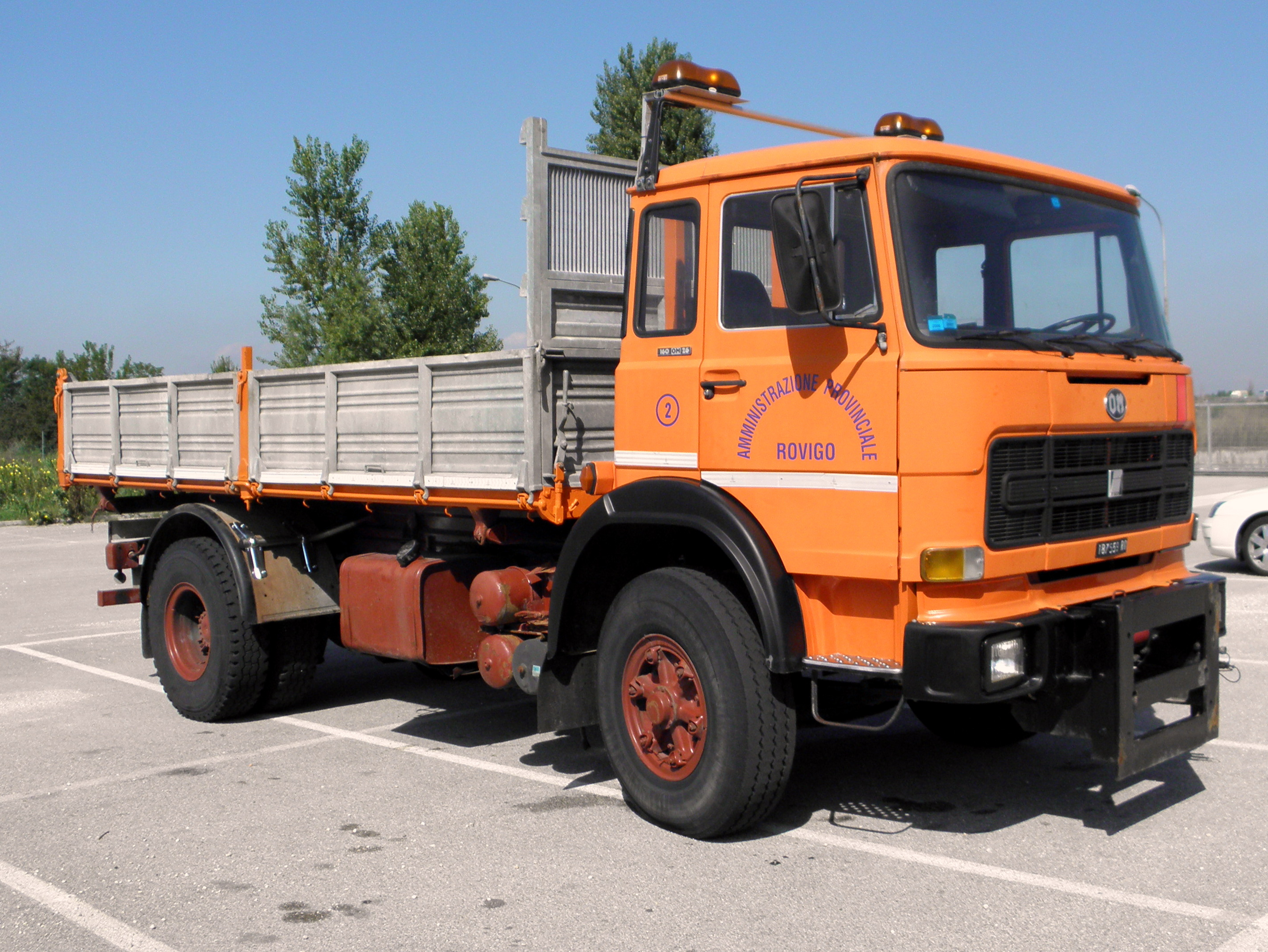 L'OM (Iveco) 160 OM 26 di proprietà dell'Amminstrazione Provinciale Rovigo.